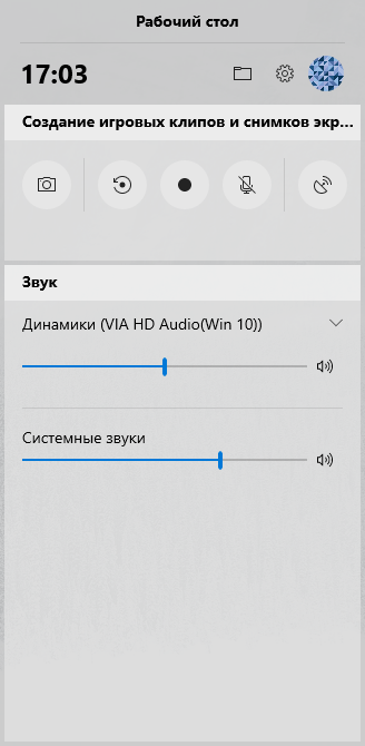 Игровая панель в Windows 10